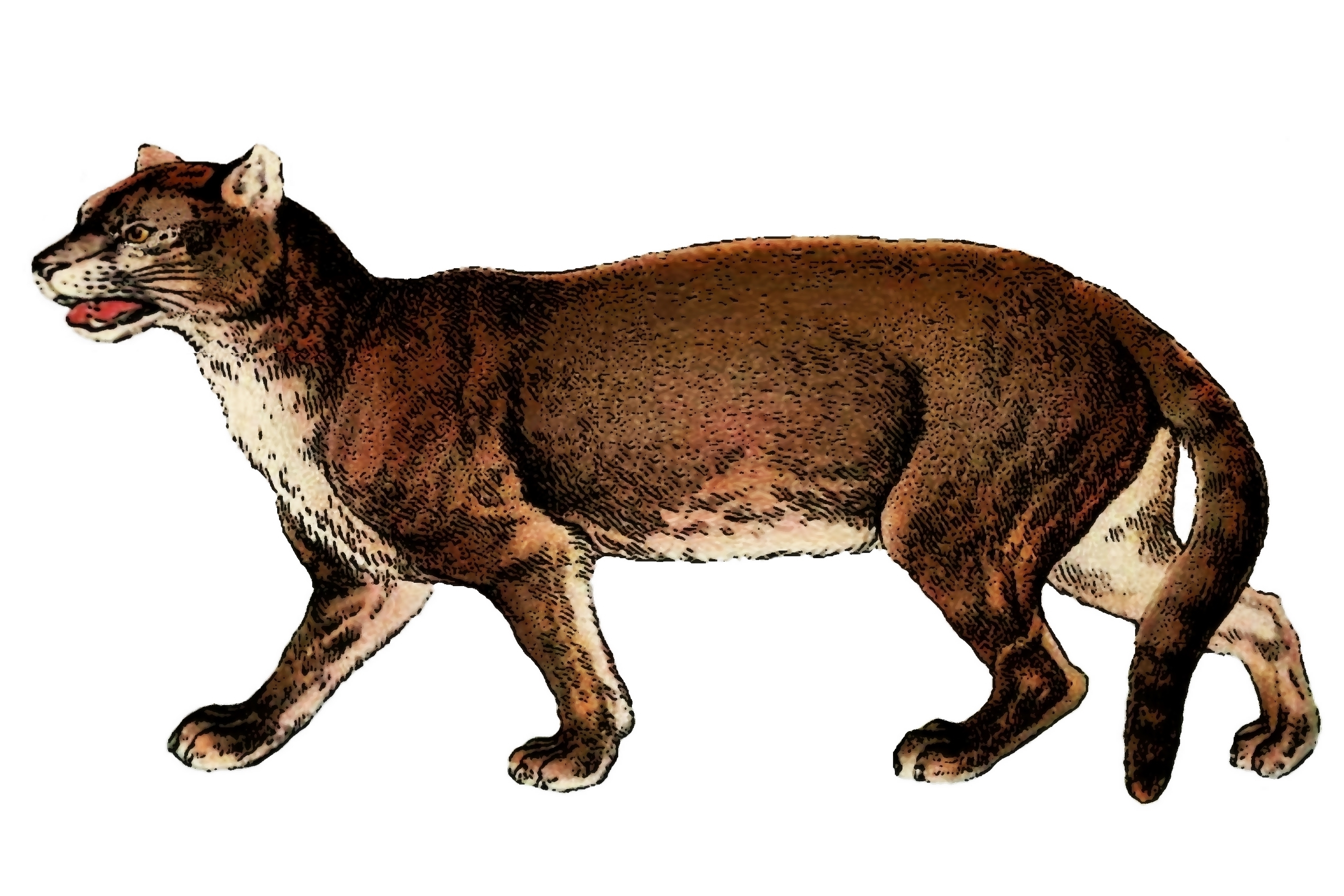 Simocyon batalleri, реконструкция